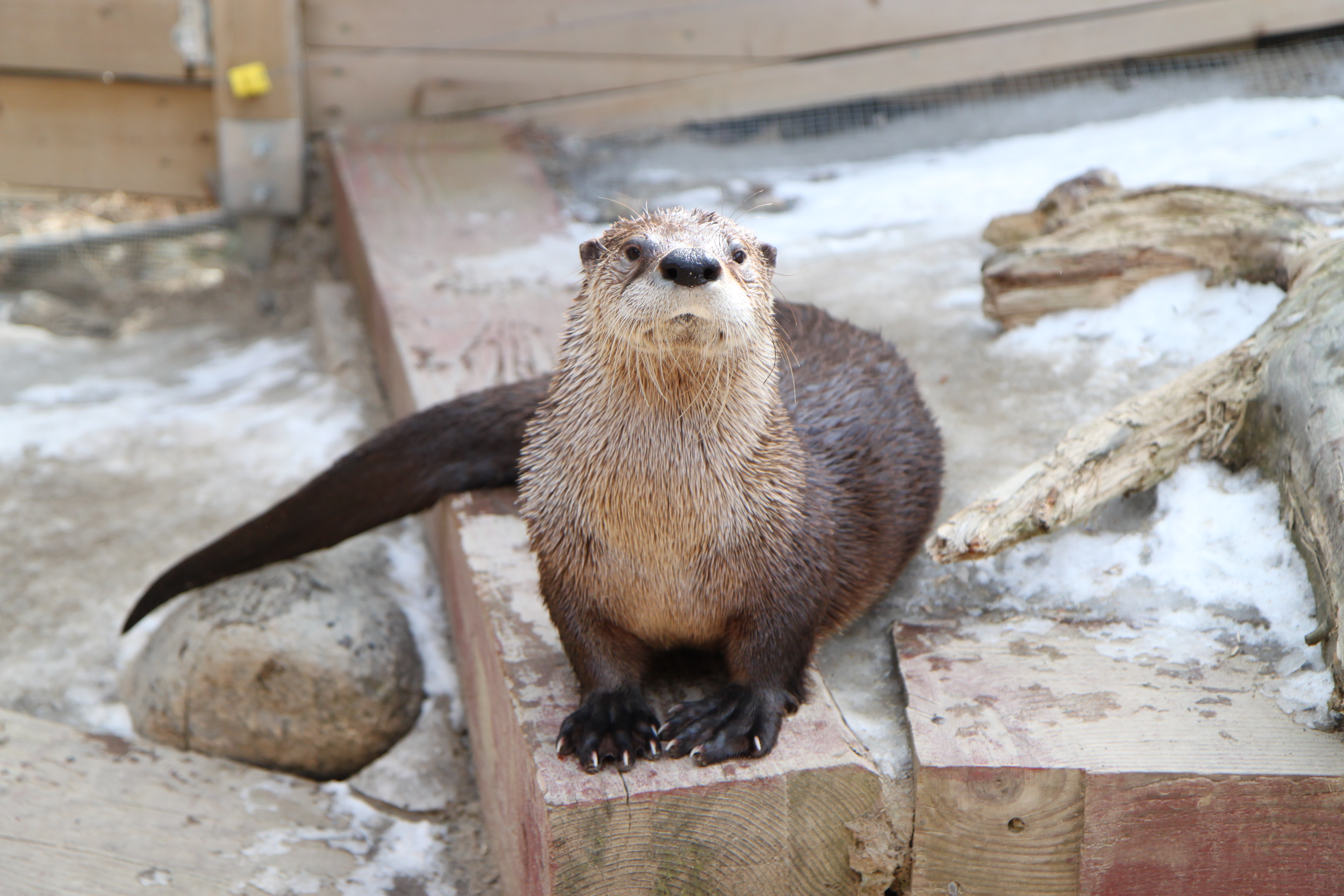 Loutre de rivière, pensionnaire du Centre de la Biodiversité du Québec